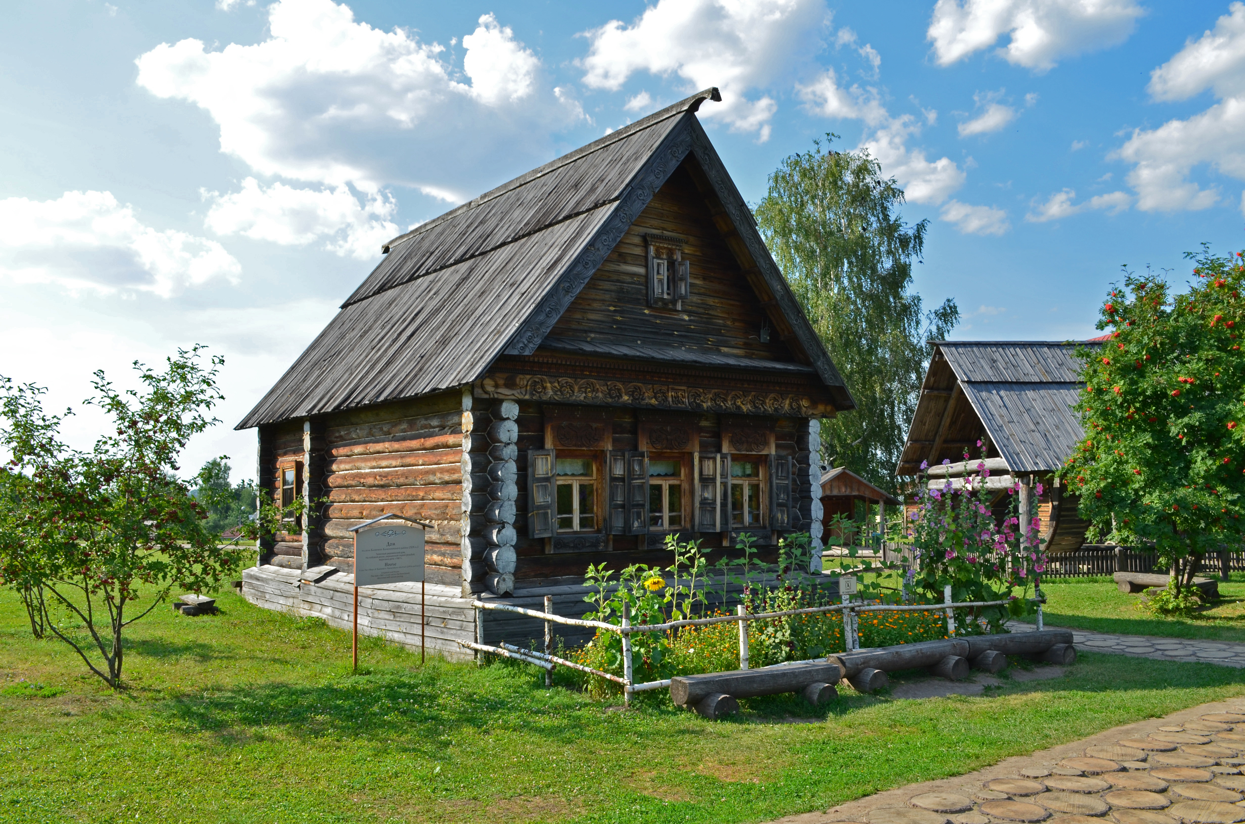 Русская изба.Суздаль.Музей деревянного зодчества.